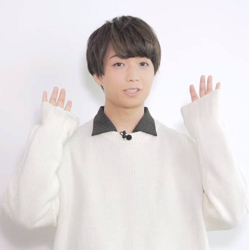 保住有哉（声優）沼落ち5秒前！声優編より